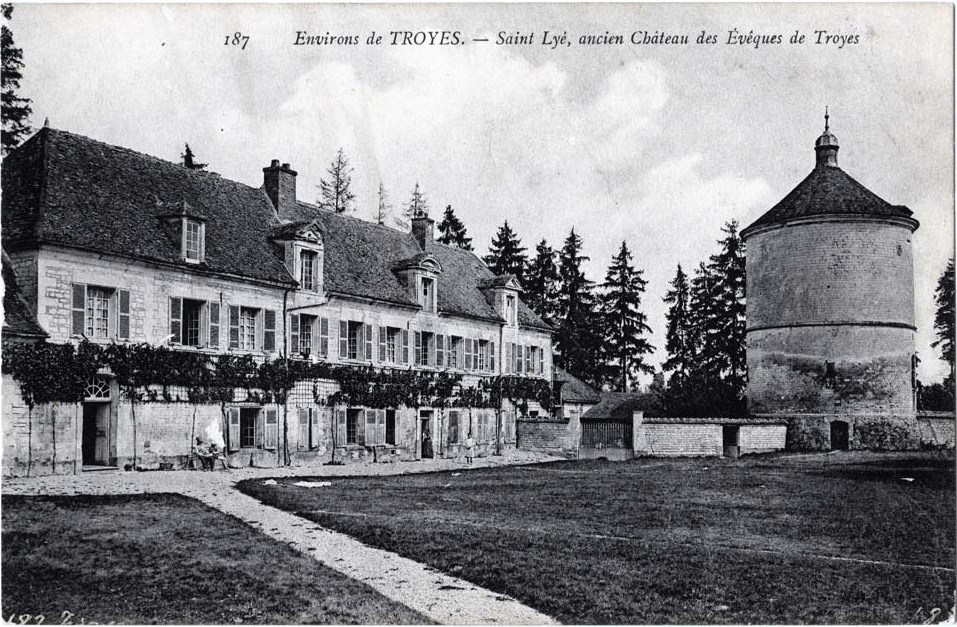 Description